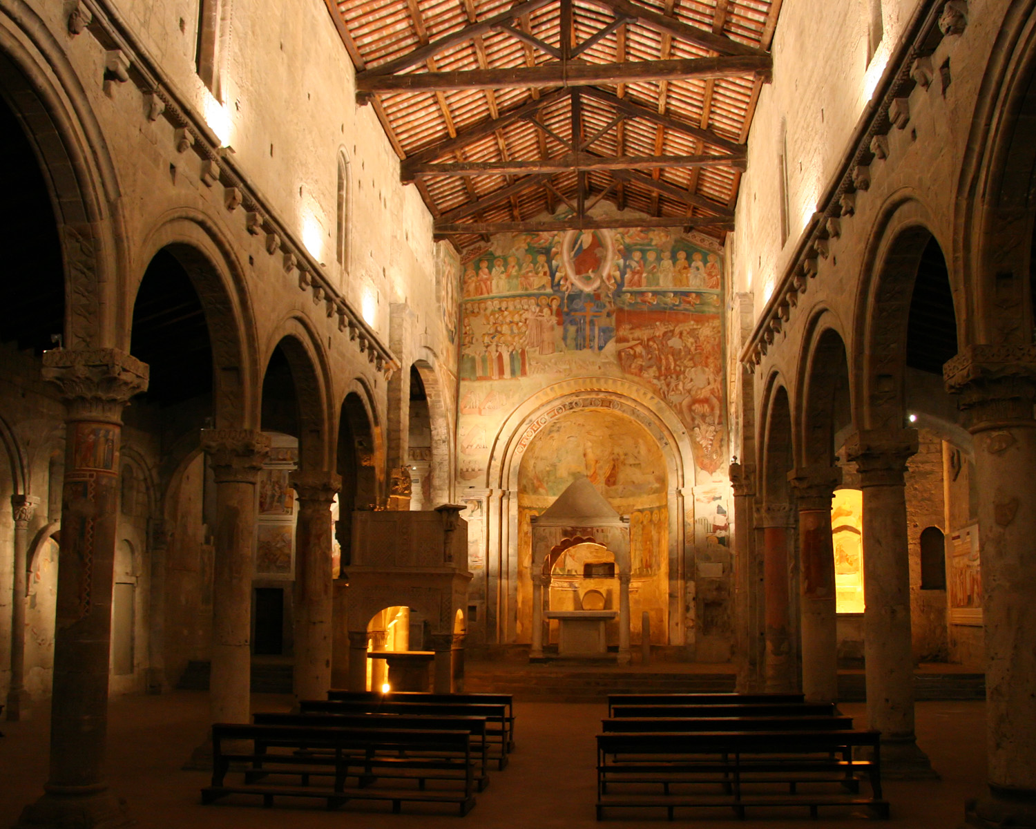 View of Santa Maria Maggiore (inside, navata) in Tuscania (VT), Italy